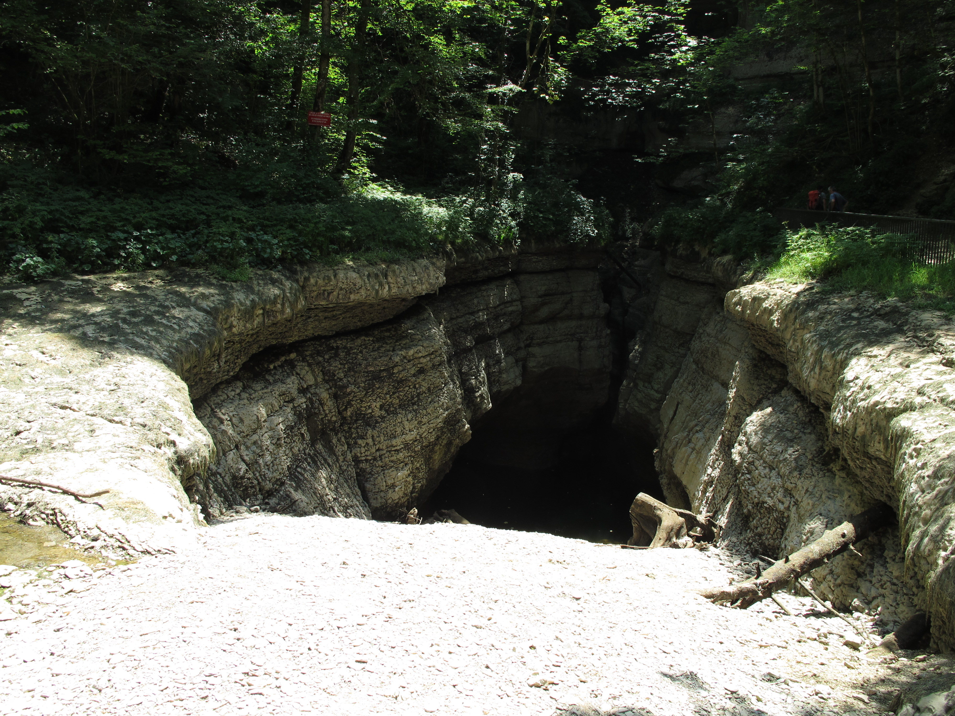 Source de l'Ain